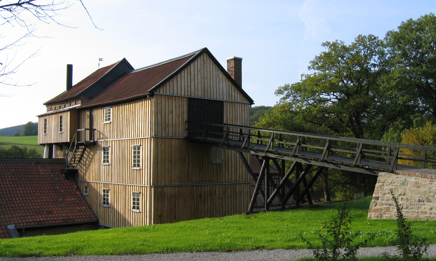 Luisenhütte Wocklum in Balve (Germany)